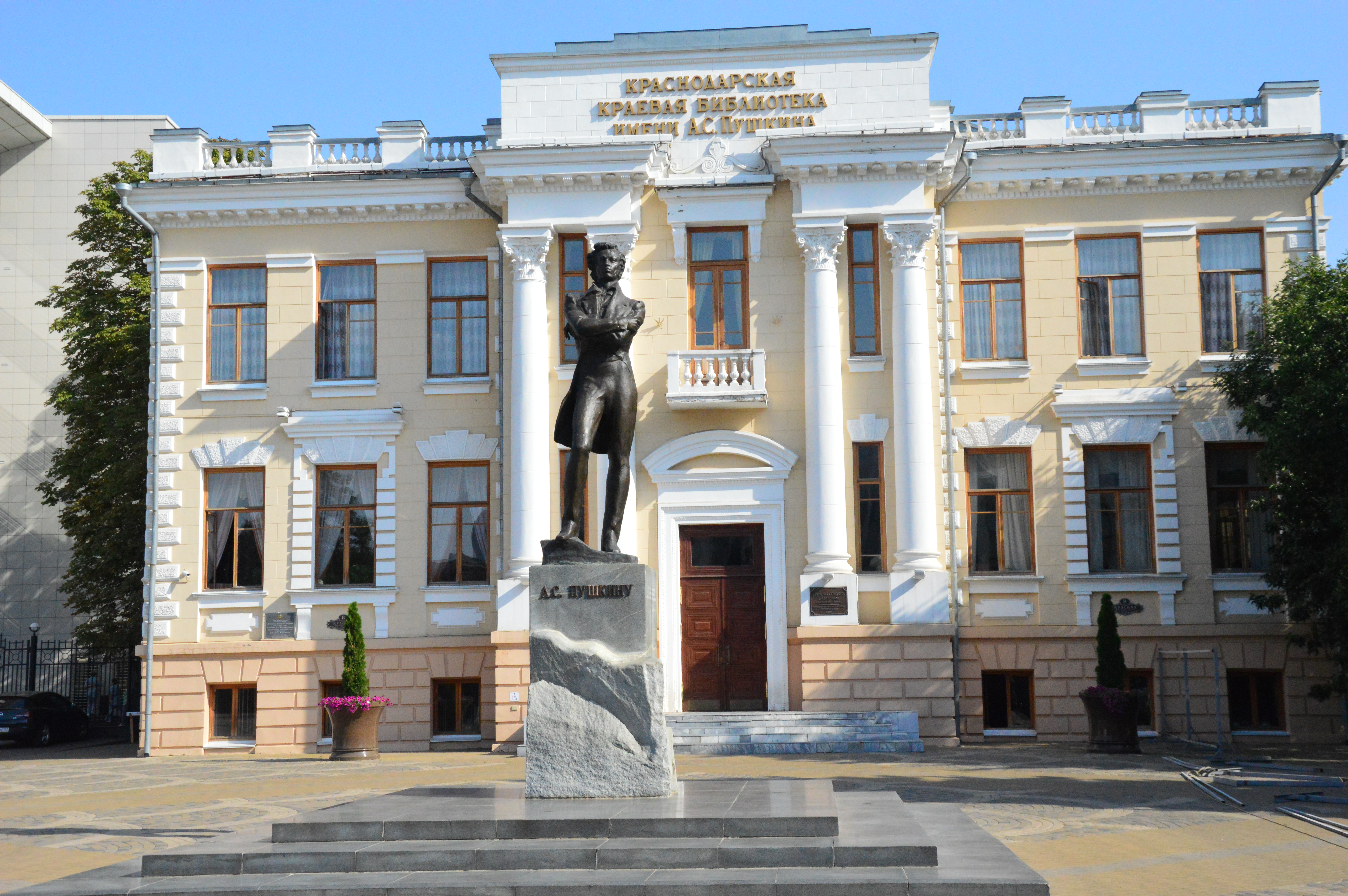 Здание армянской школы: улица Красная, 8, Краснодар, Краснодарский край